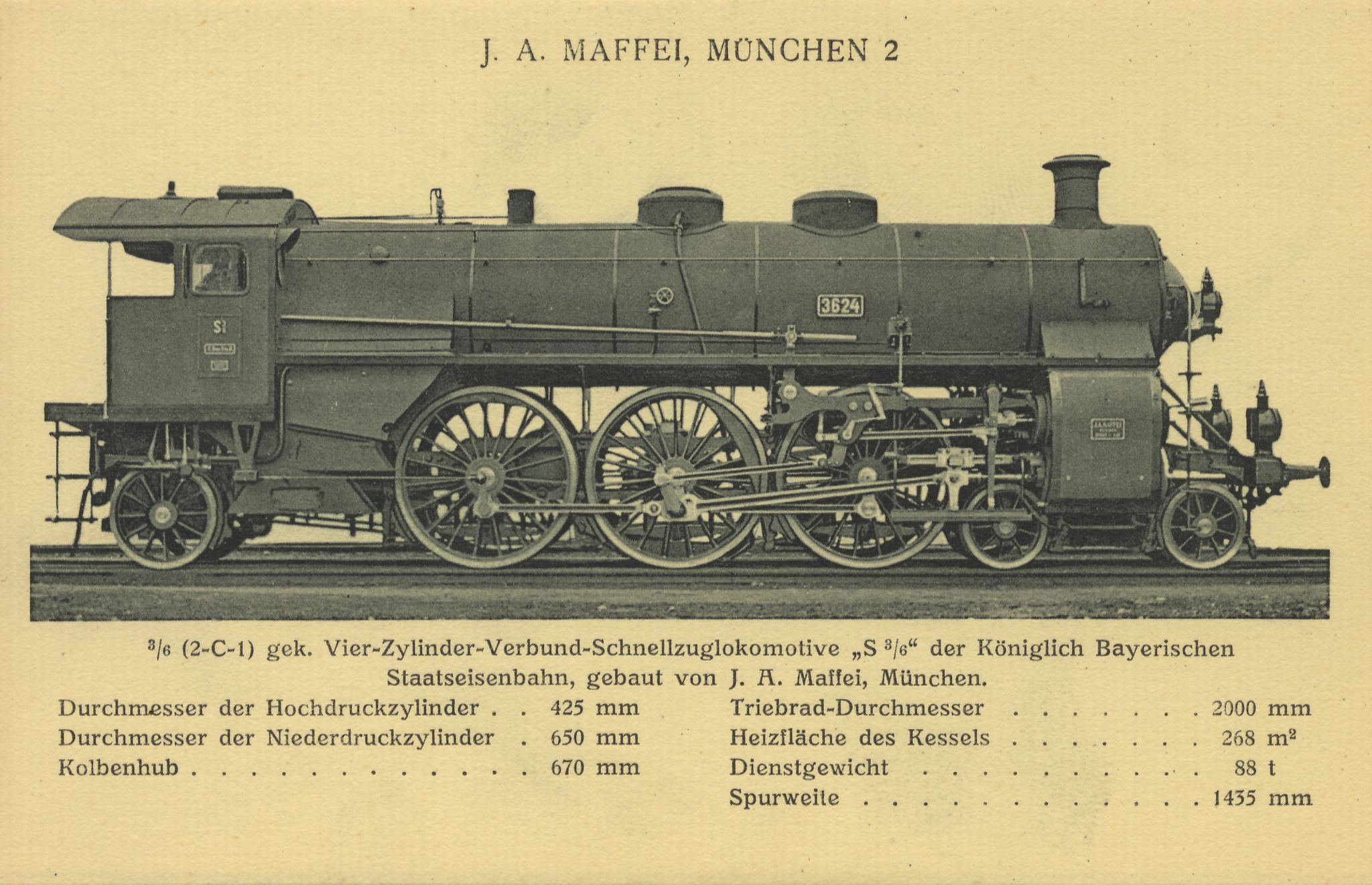 Vier-Zylinder-Verbund-Schnellzuglokomotive 'S 3/6', gebaut von J. A. Maffei